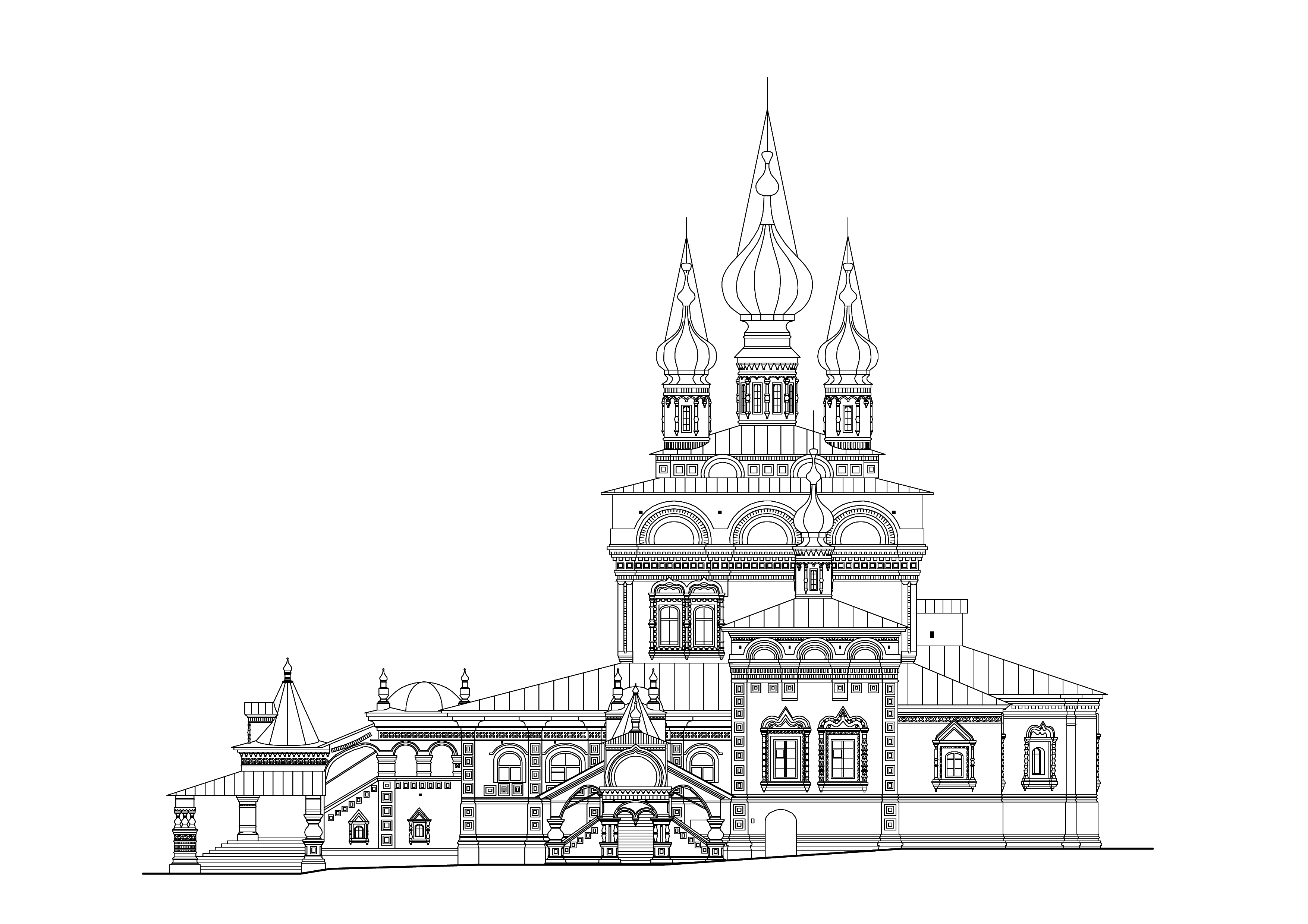 Троицкий собор. Чертёж. Город Соликамск